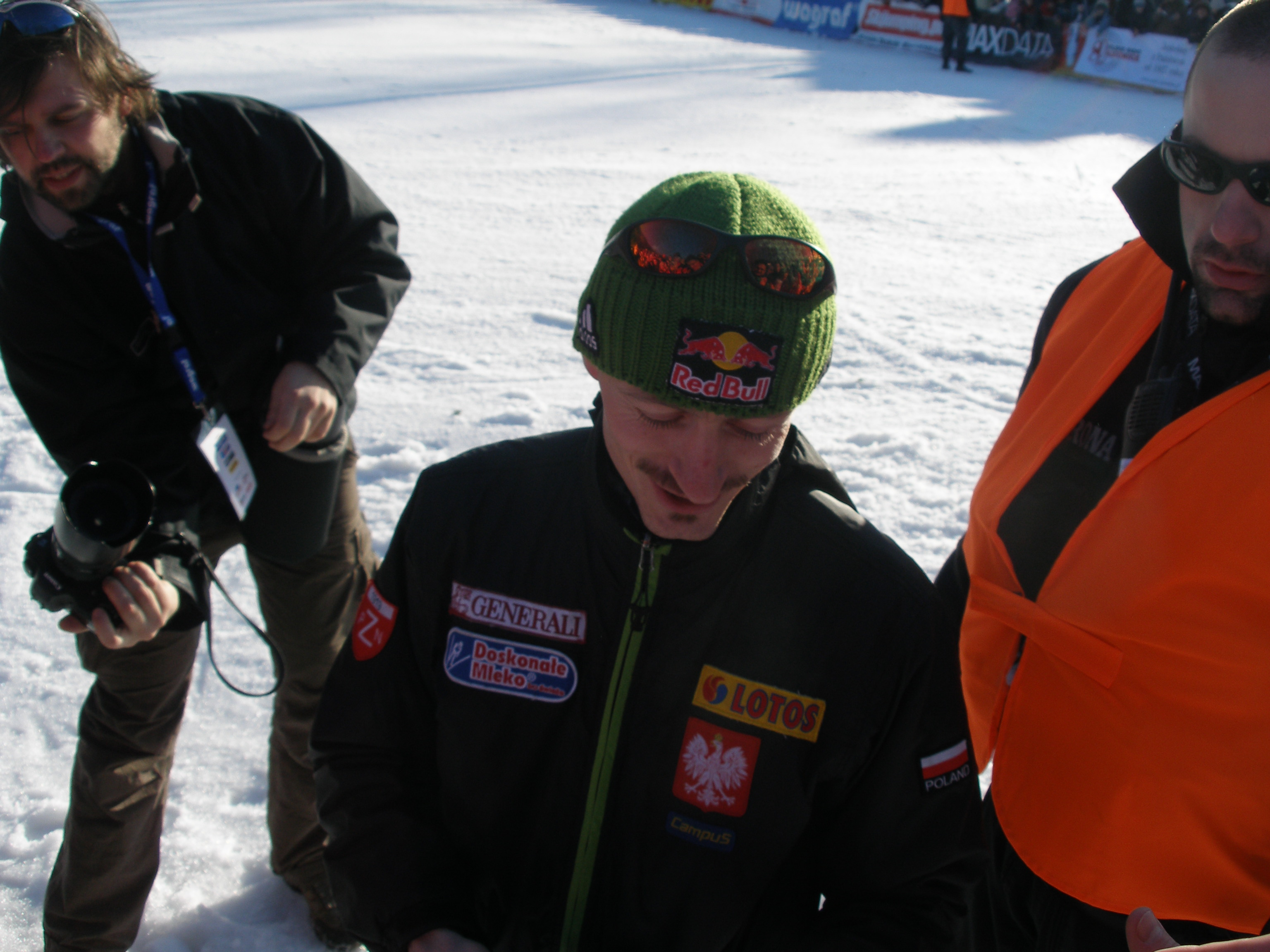 Adam Małysz na zawodach w Szczyrku